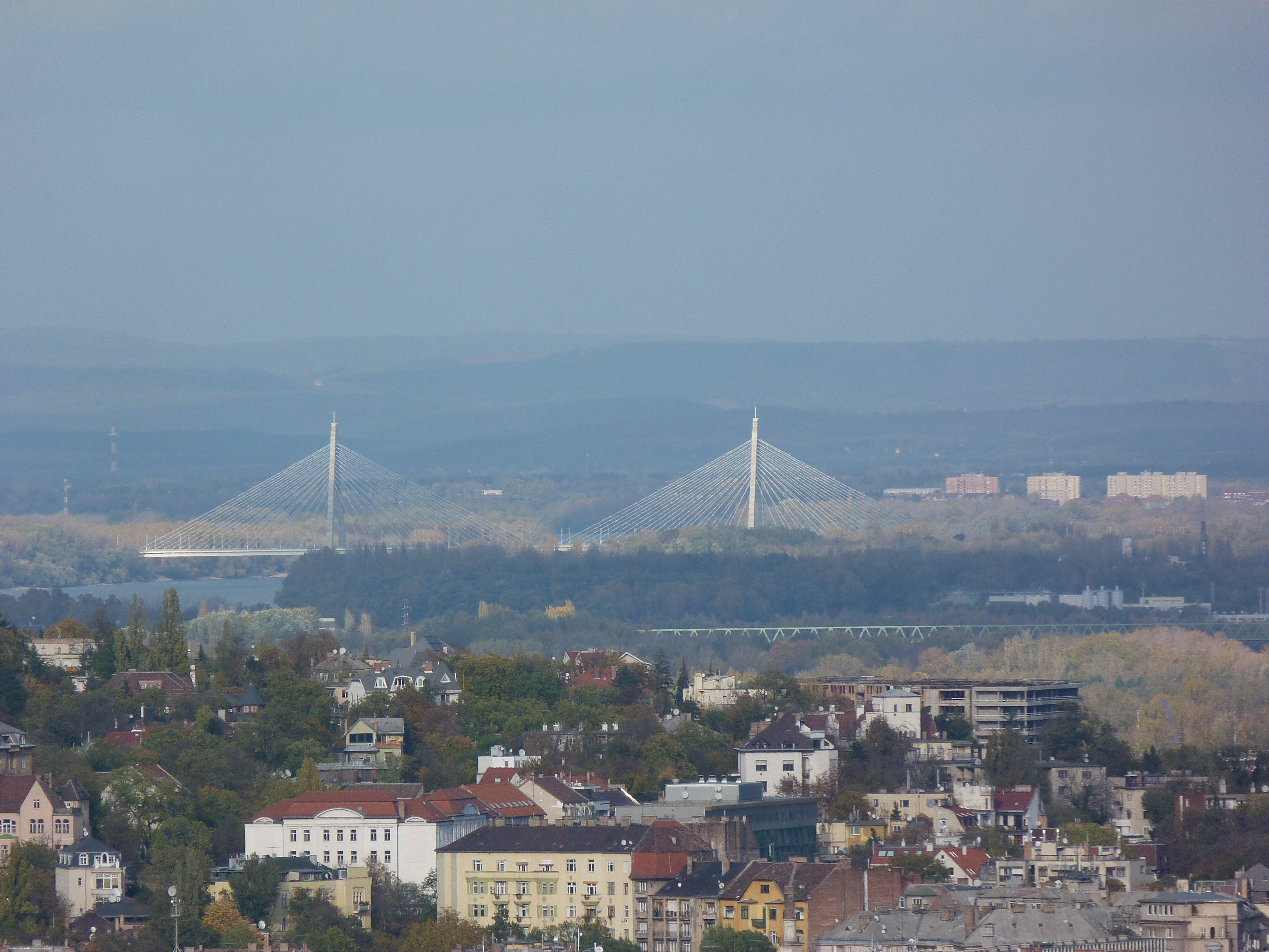 A felvétel 2012. november 4 -én készült Budapesten, a Sashegy 3. számú magaslati pontjáról. Megyeri híd.